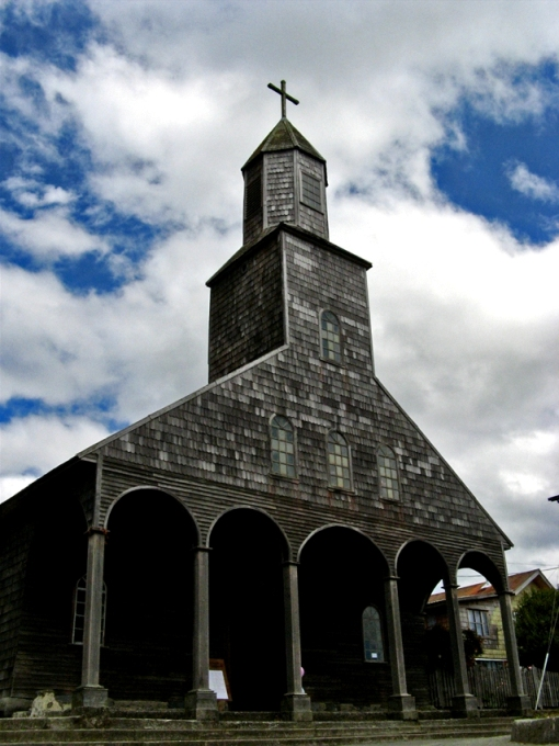 Iglesia Santa María de Loreto en Achao, comuna de Quinchao, Chiloé (Chile)Isla de Chiloé - Iglesia Santa Maria de Achao